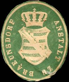 Siegelmarke Titel: Anstalt zu Braeunsdorf Beschreibung: grün, weiß, geprägt Ort: Bräunsdorf Größe: 4x3